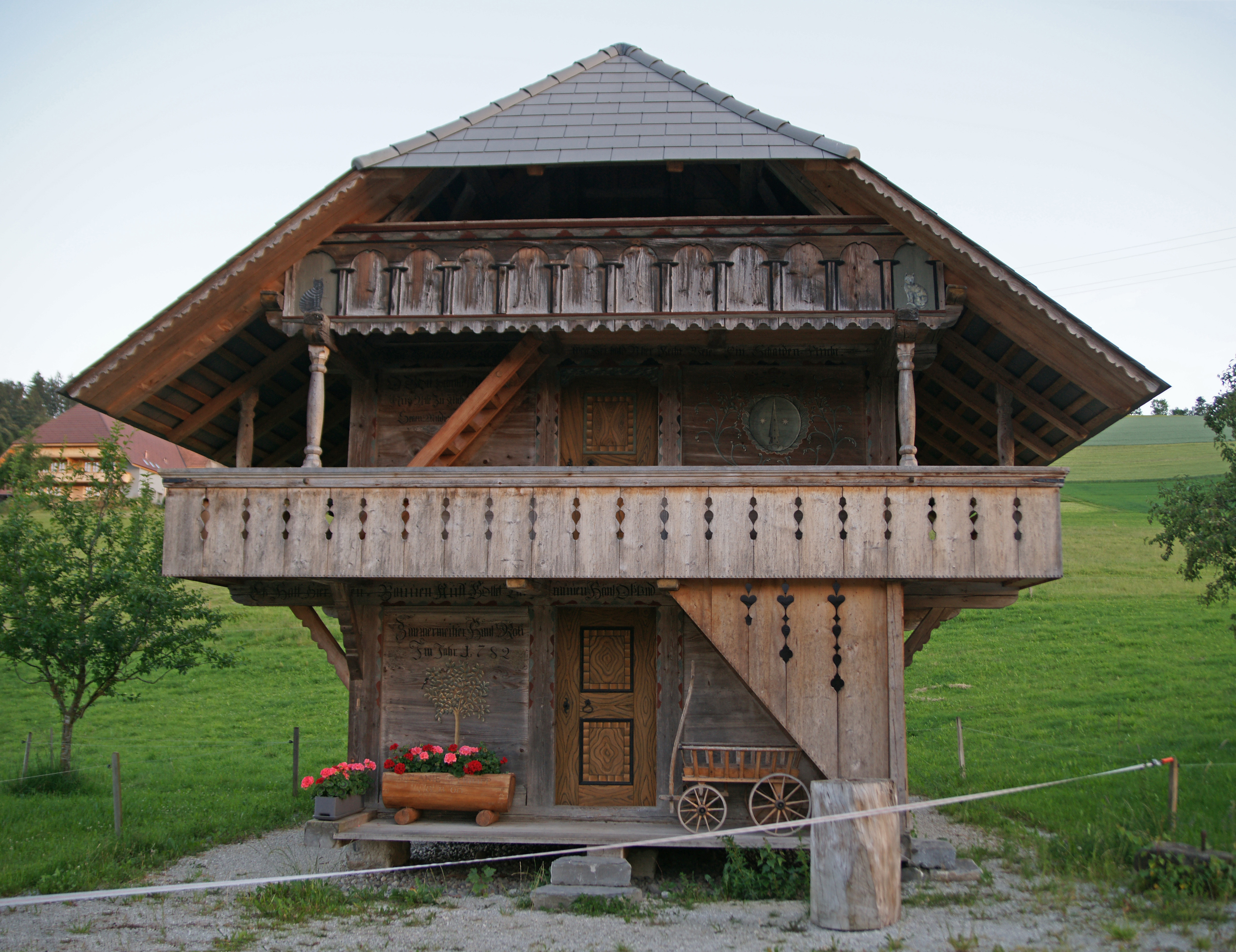 Schweizerisches Inventar der Kulturgüter von nationaler Bedeutung: Speicher, Oberbalmstrasse 209 AKGS-Nr. 9232, Oberbalmstrasse 209A, Oberbalm (BE), 597.156 / 191.378, Kategorie: A, Objektart: Wohnbauten und ihre Nebenanlagen, Ländliche Kleinbauten (Speicher, Ofenhäuser, Waschhäuser)